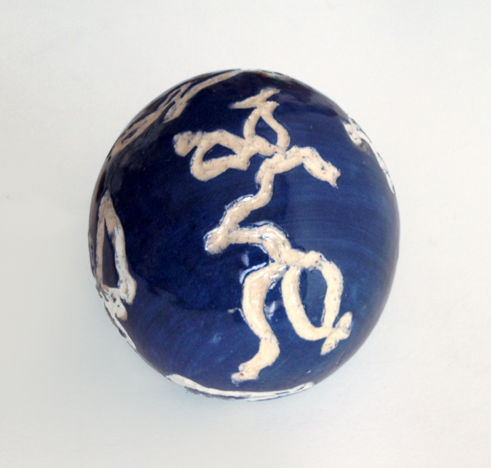 Sculpture en céramique Sculpture et prise de vue de Sara Holt